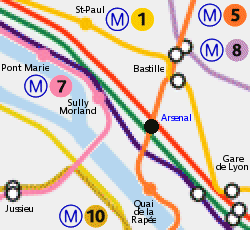 Extract from Image:Paris Metro map.gif. en: Locations of Arsenal Paris metro ghost station. fr: Localisation de la station fantôme du métro de Paris Arsenal.